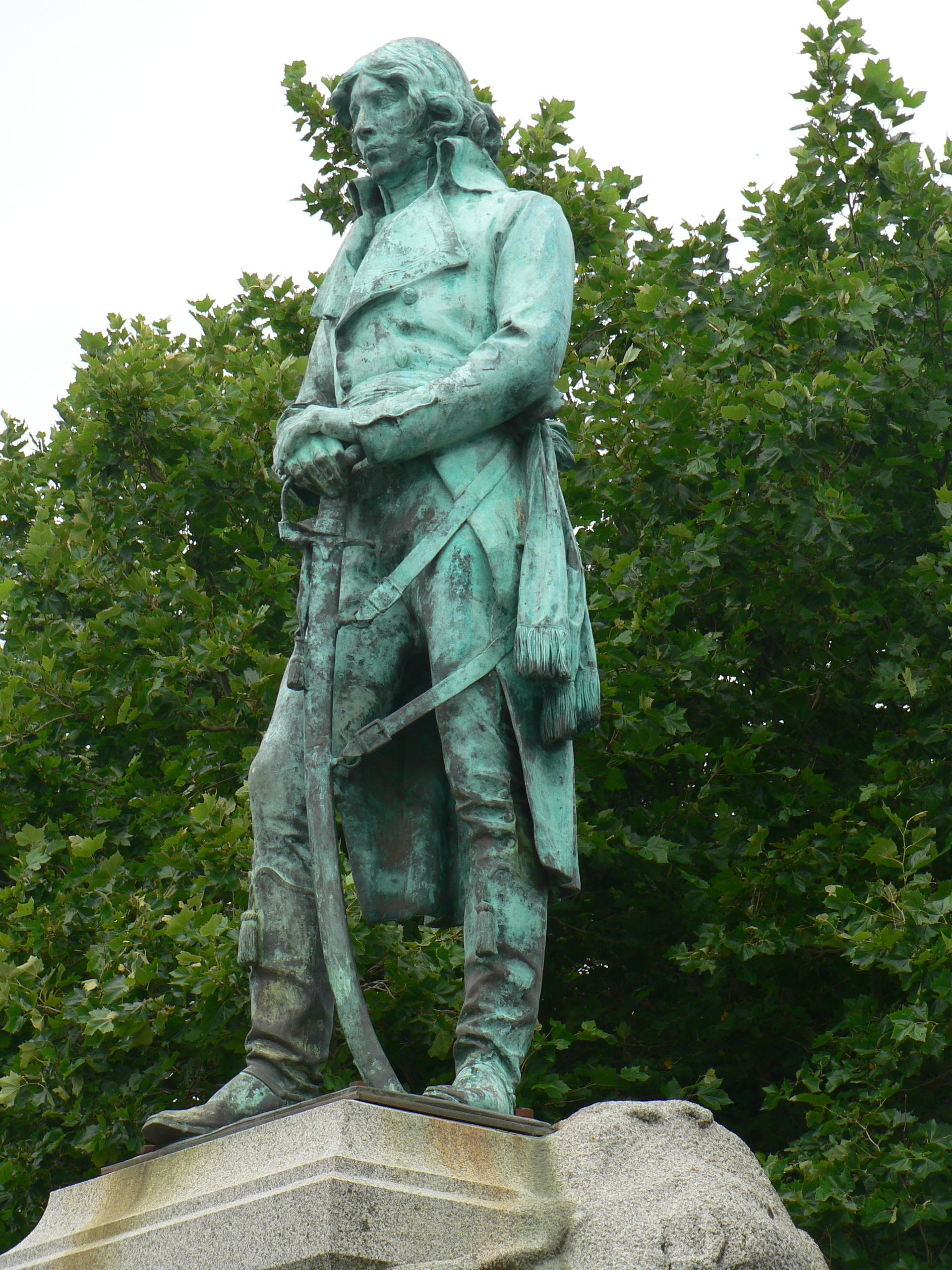 Monument élevé à la mémoire de Lazare Hoche à Quiberon, par Jules Dalou. Inauguré le 20 juillet 1902.